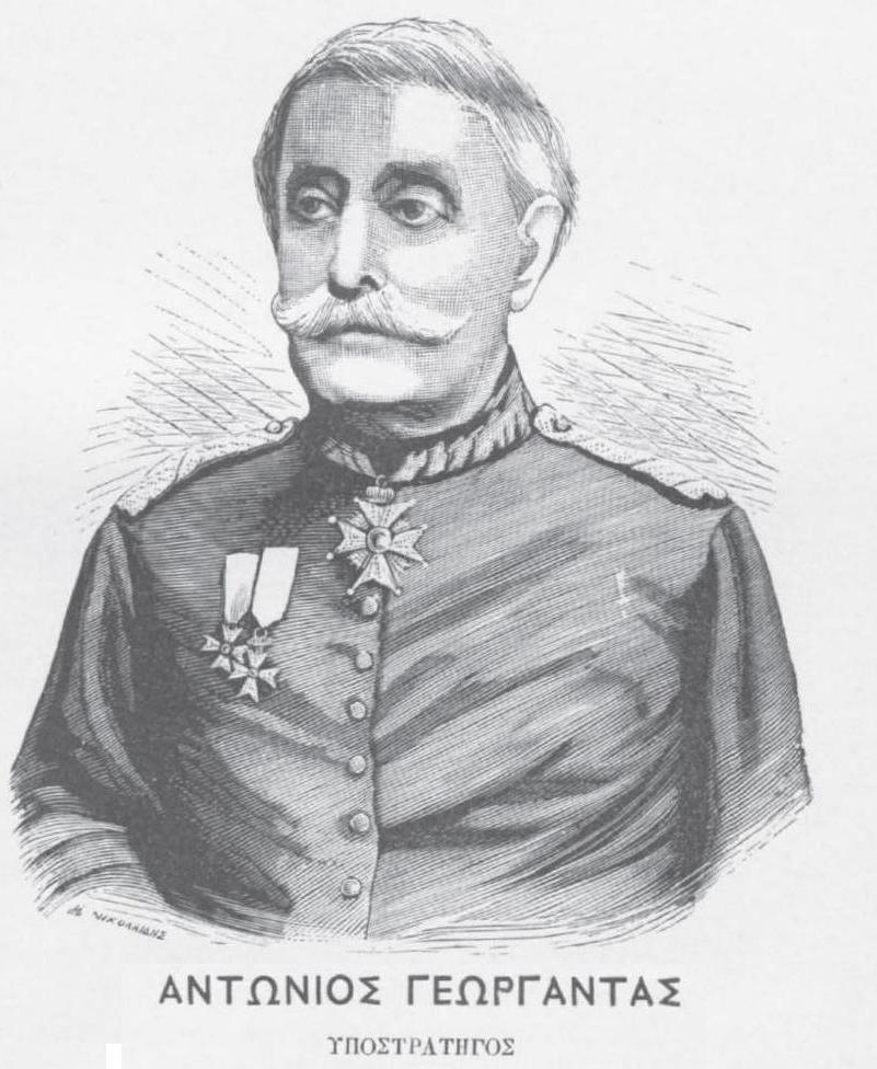 Antonios Georgantas, griechischer Generalmajor, 19. Jahrhundert